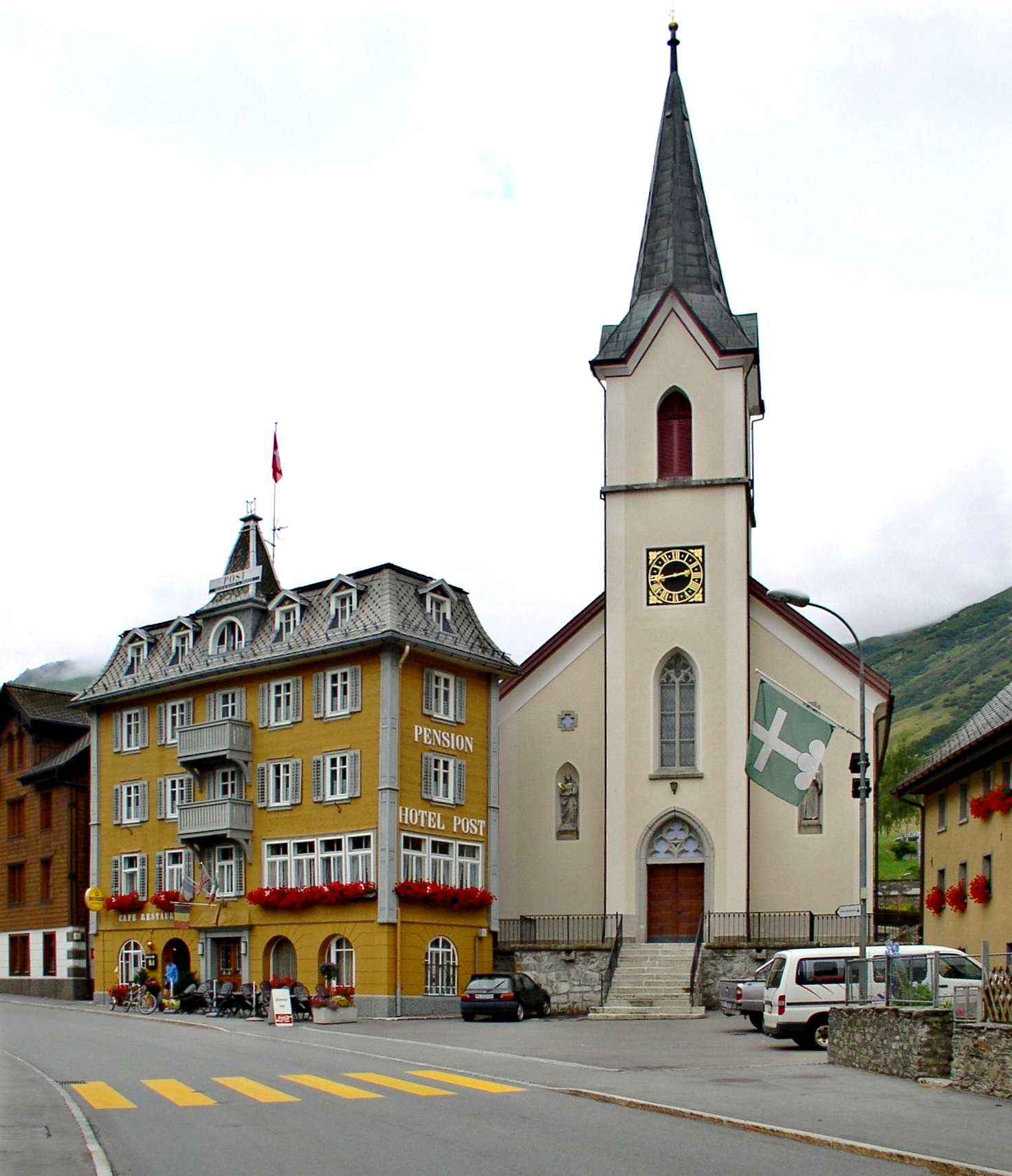 Realp, Kanton Uri, Schweiz; Dorfzentrum mit römisch-katholischer Kirche und Hotel "Post"